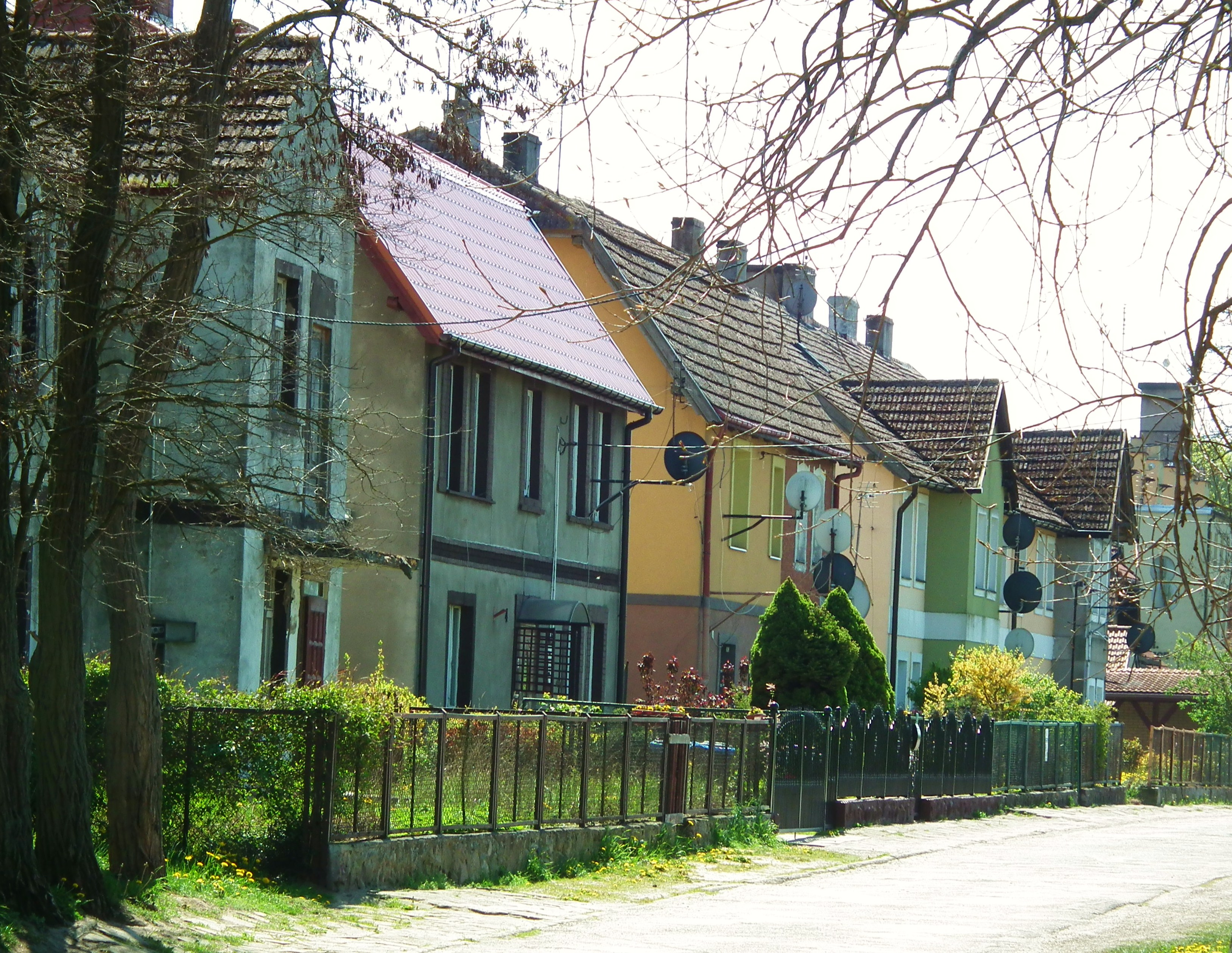 Buniewice na Wyspie Chrząszczewskiej.